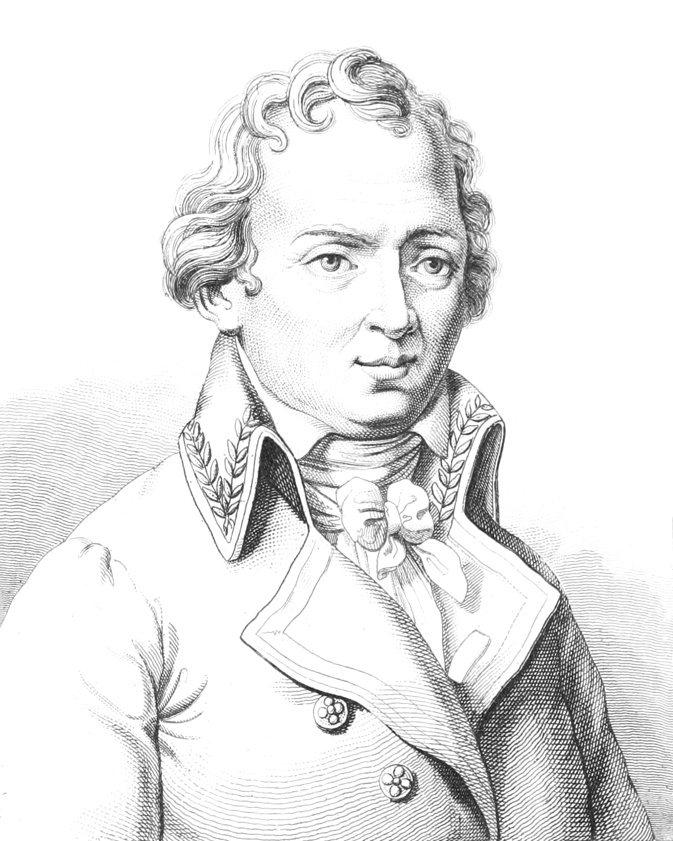 Portrait de Charles-François Dupuis dans la réédition en 1836 de l'Abrégé de l'origine de tous les cultes par J. Schroeder.